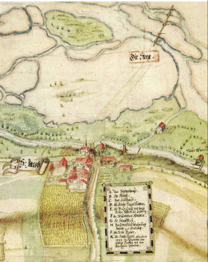 Die Siedlung St. Jakob an der Birs mit dem Flussübergang, 1657. Die markante Gebäudemasse ist das Siechenhaus, knapp darüber befindet sich die Kirche. Auf der anderen Seite der Strasse von links nach rechts: Zoll- oder Wirtshaus, Ziegelhütte, Wasserturm und Schäferei. Das Gewässer, das quer durch das Bild fließt, ist der St. Albanteich, oberhalb davon sind die zwei Walken. (Ausschnitt aus einem Plan des Flusses Birs von 1657. Original im Staatsarchiv Basel-Stadt.)